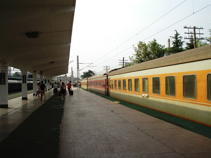 四方火车站